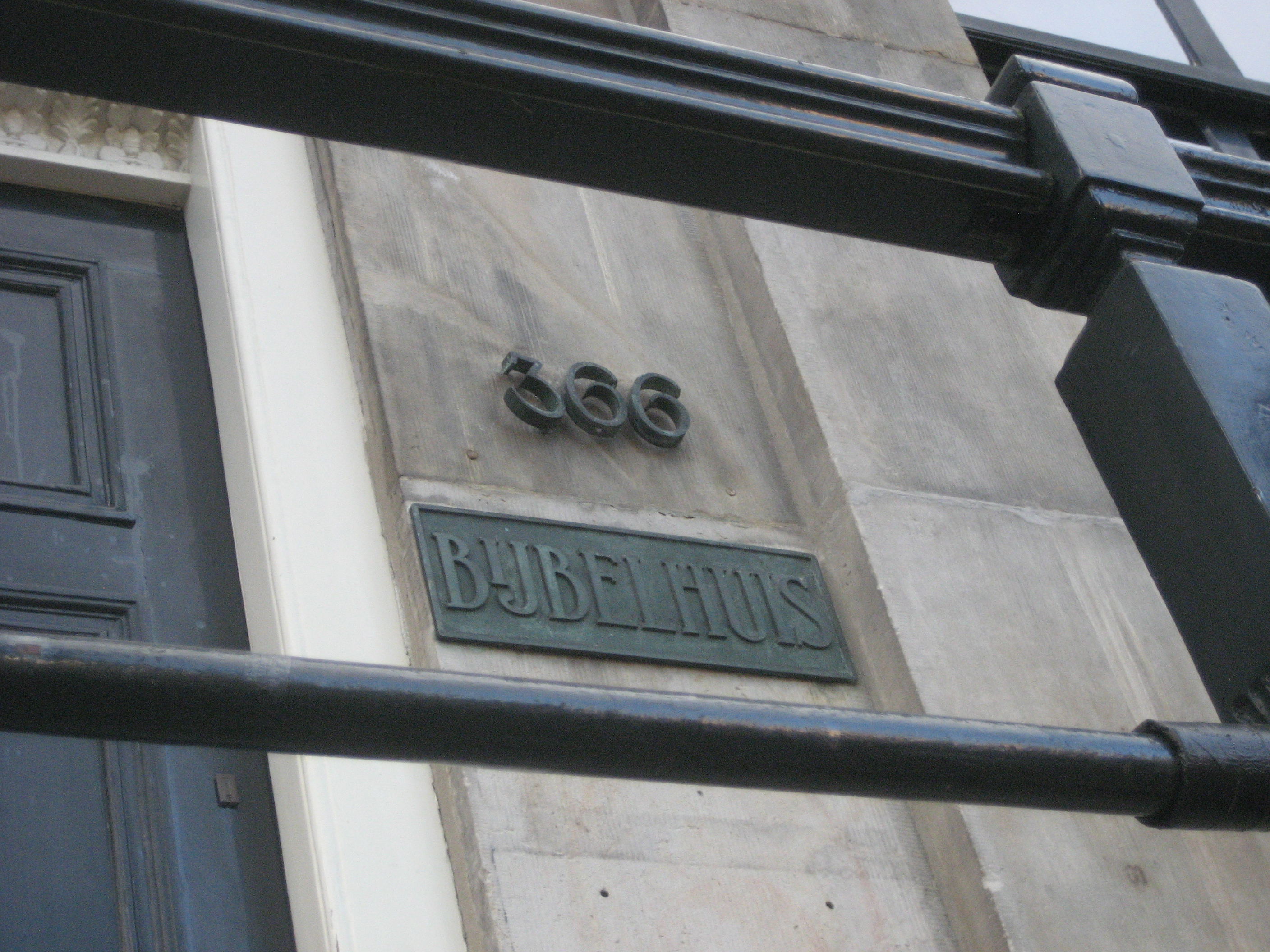 Bijbelhuis = Bijbels Museum, Herengracht 366-368, Amsterdam (Nederland)